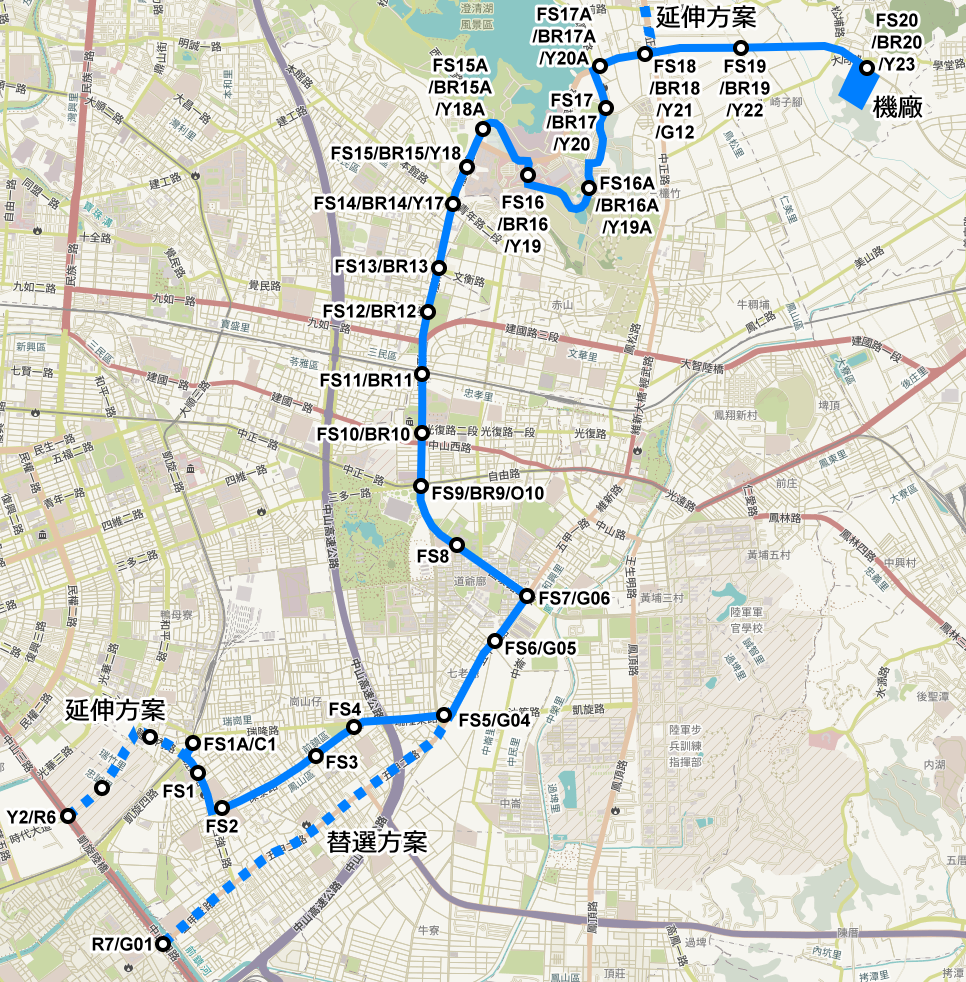 2014年頃的鳳山線